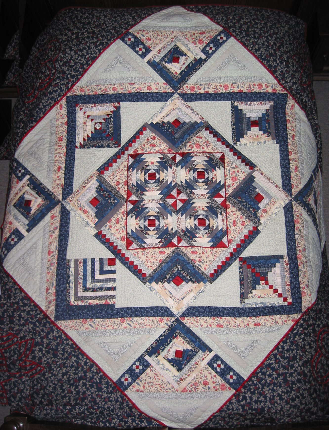 Quilt